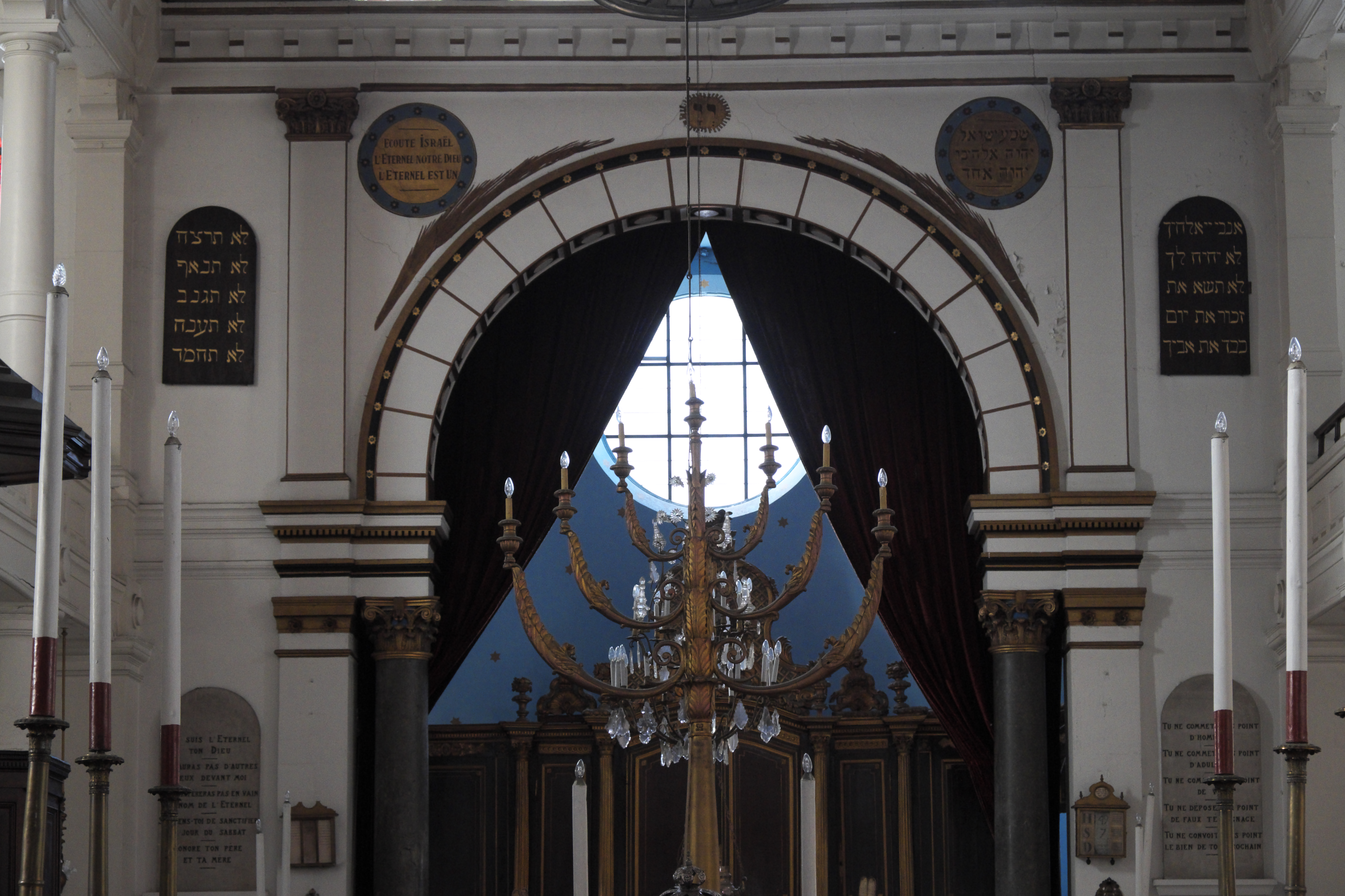 Synagoge in Bayonne im Département Pyrénées-Atlantiques (Region Aquitaine-Limousin-Poitou-Charentes/Frankreich), Innenraum